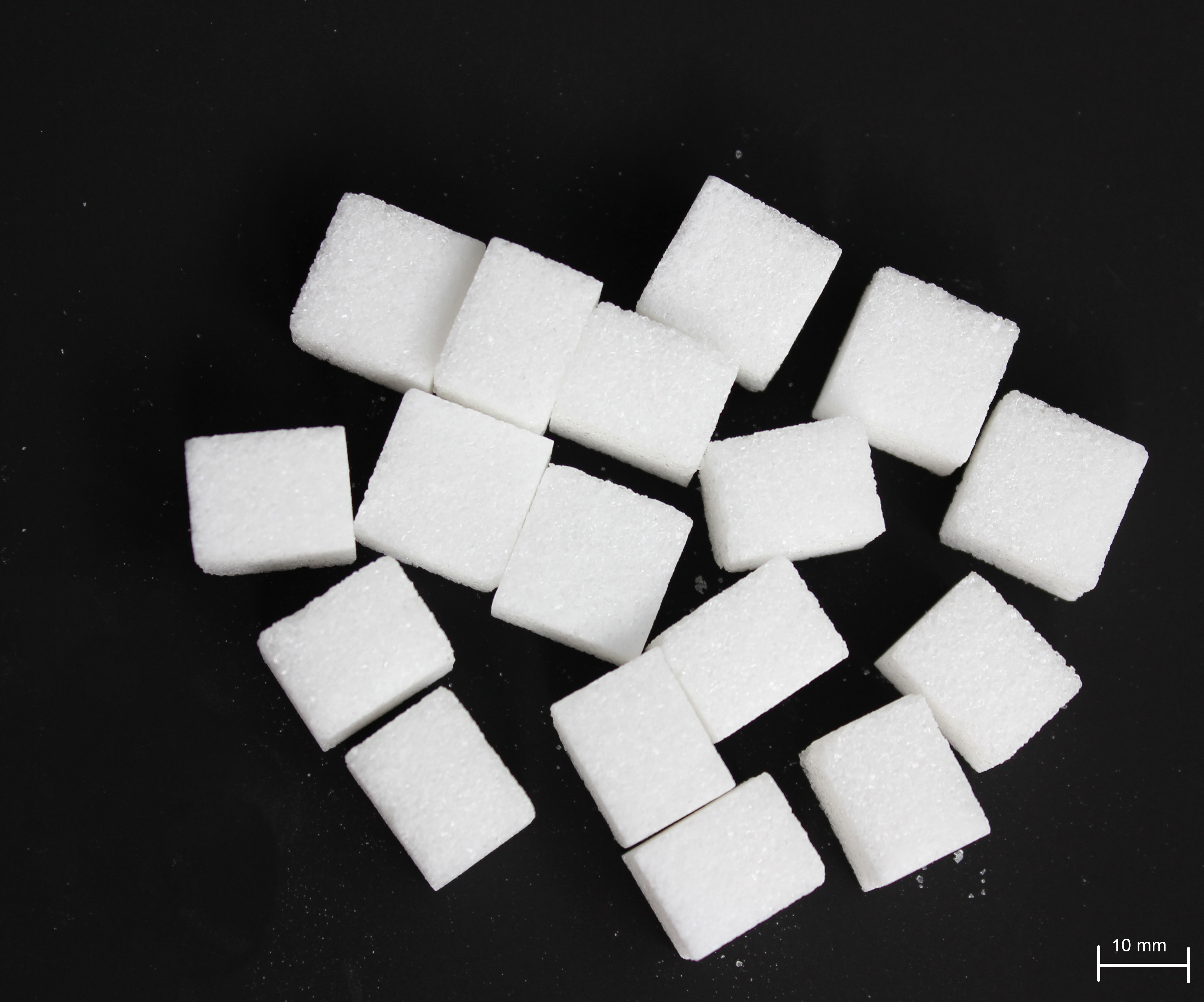 Photo von Würfelzucker mit 1 Cent-Münze zum Größenvergleich.